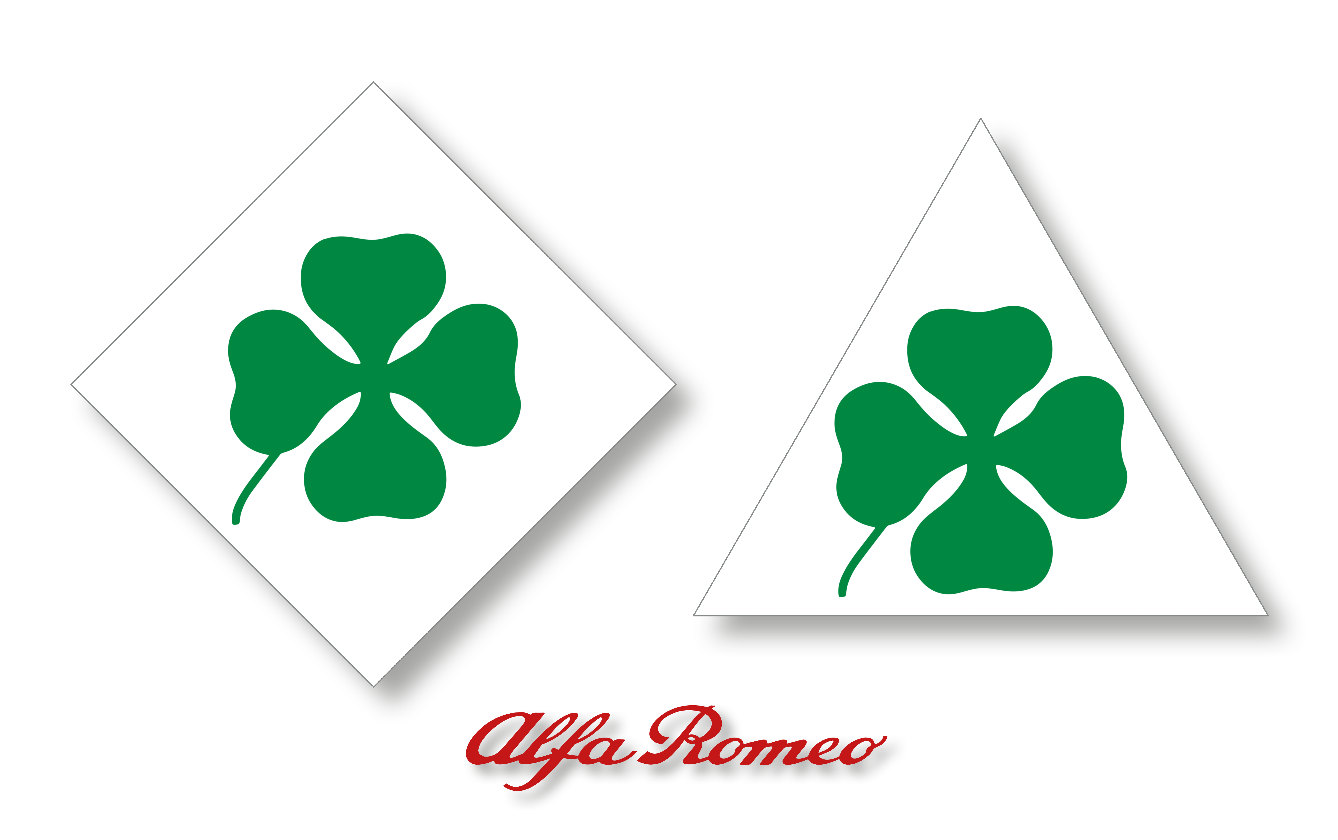 Beide Versionen des "Quadrifoglio Verde" von Alfa Romeo